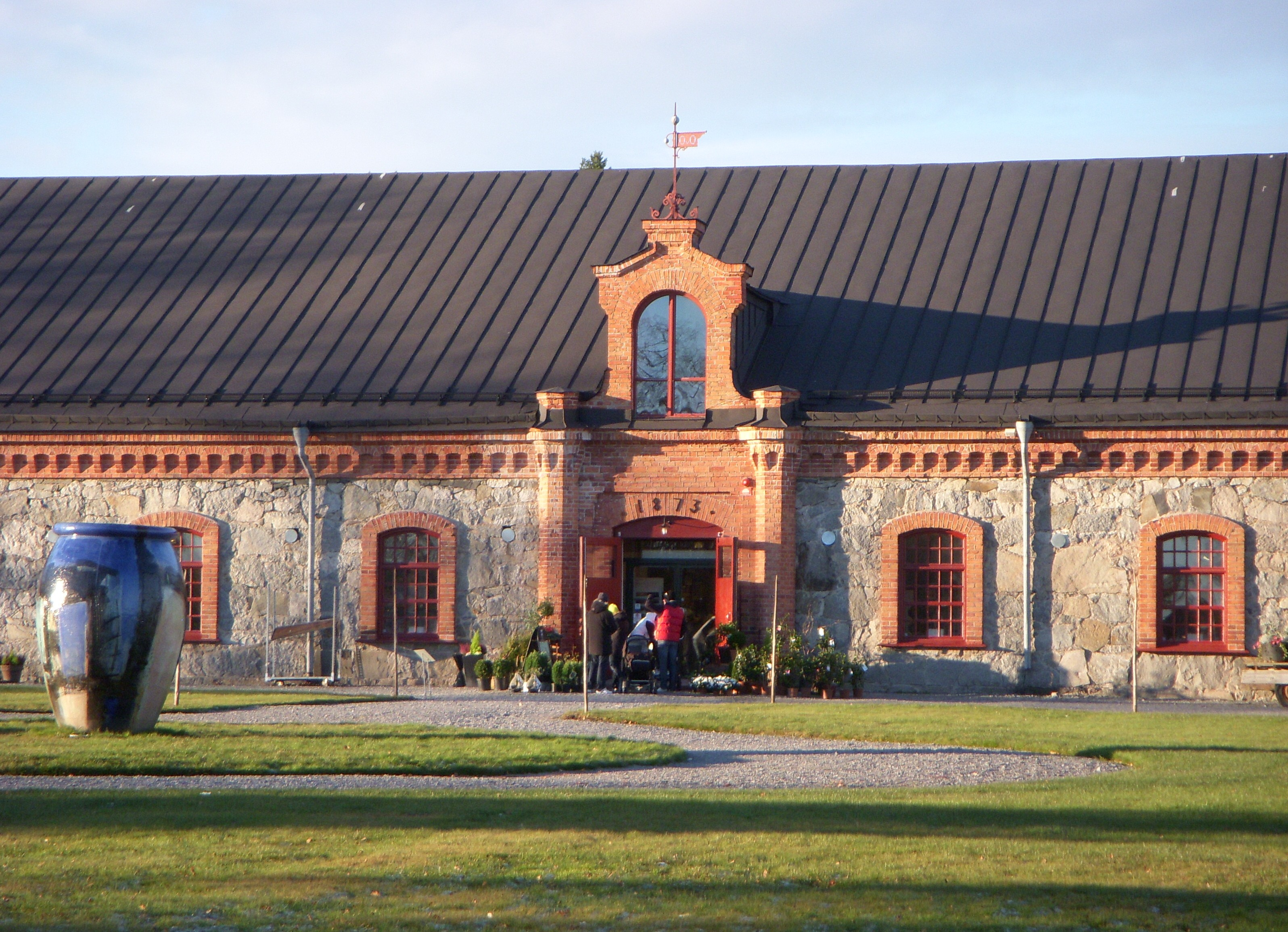 Steninge slott, kulturcentrum i gamla stallet